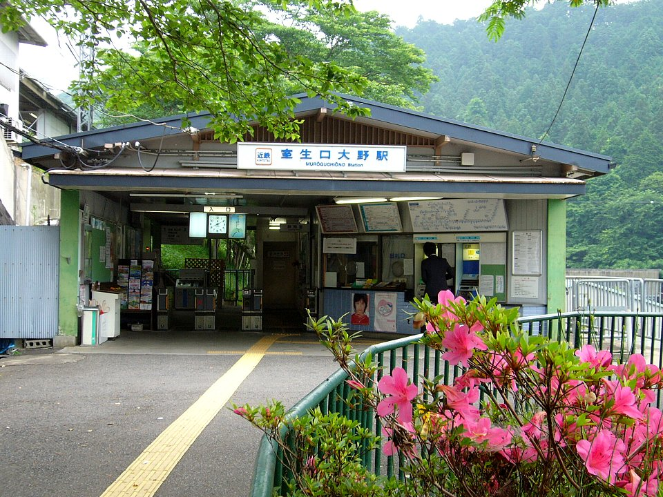 近鉄ja:室生口大野駅駅舎 2006年6月 Bakkai撮影